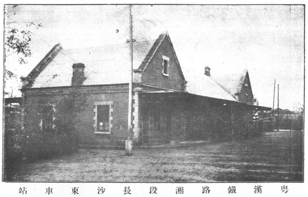 鐵路協會會刊-英國退還庚款築路問題（民國十五年六月）